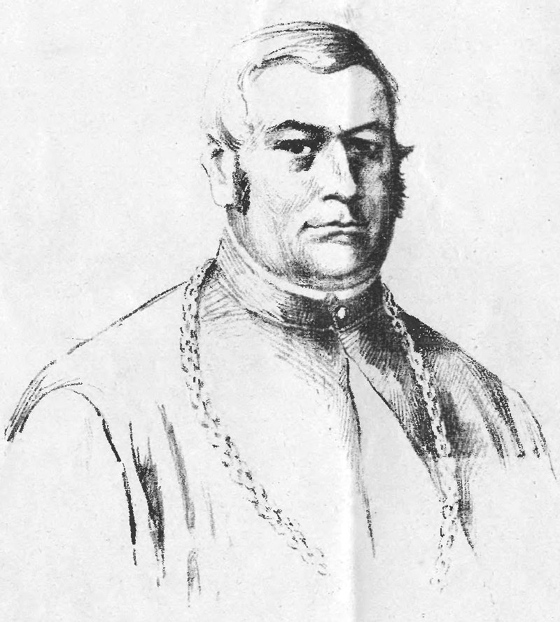 biskup pomocniczy wrocławski